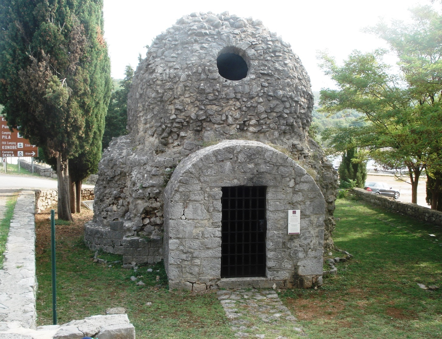 Croatia_-_Krk_-_Kornic_-_Church_St._Dunat